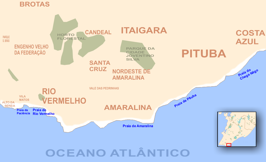 Mapa de Salvador (Bahia, Brazil) - Praias: Paciência, Rio Vermelho, Amaralina, Pituba e Chega-Nêgo.